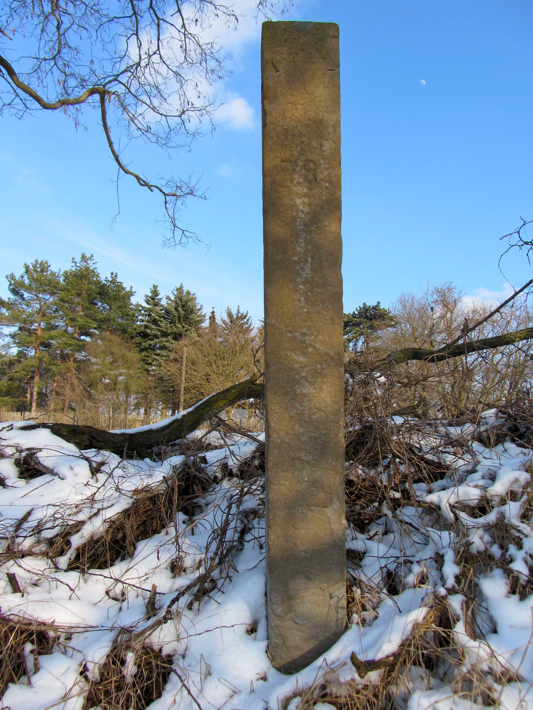 Historischer Grenzstein. Läuferstein Nr. 78 zwischen Grenzstein 47 und 48 der sächsisch-preußischen Grenze 1815. Der Standort ist den historischen Karten zusätzlich mit „HP Landesgrenze“ gekennzeichnet.